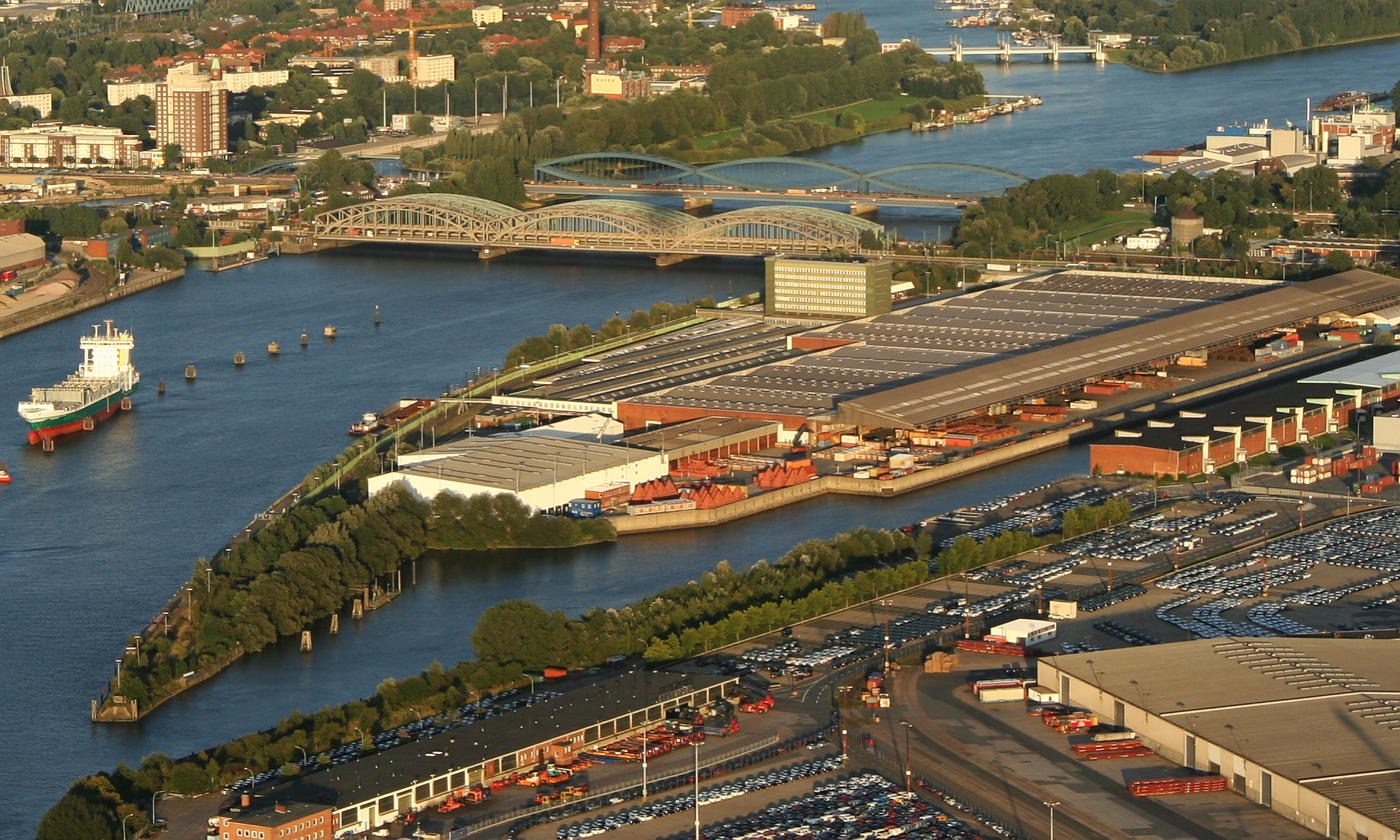 Vordergrund: links Norderelbe, mitte und rechts Moldauhafen - Bildmitte: Norderelbbrücken - Hintergrund: Billwerder Bucht, Kaltehofe